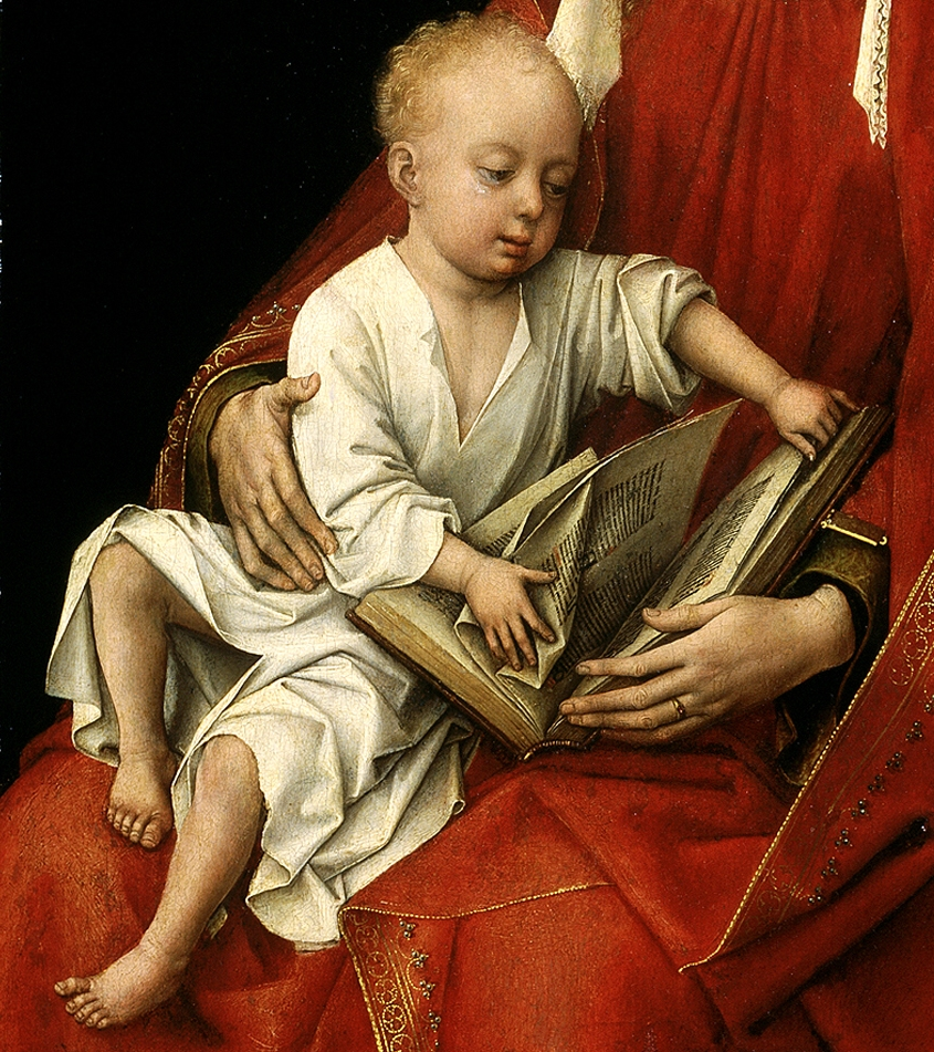 Esta obra, conocida como la Madonna Durán, representa a la Virgen María llevando sobre sus rodillas al Niño Jesús.